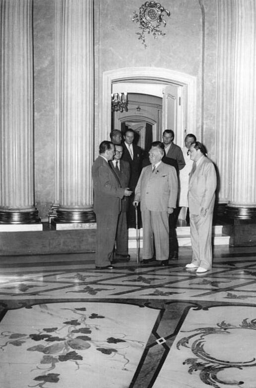 Zentralbild Sturm 8.9.1955 Präsident Wilhelm Pieck besichtigte die wiederaufgebaute Staatsoper-Präsident Wilhelm Pieck besichtigte am 8. September 1955 die in alter Schönheit wiedererstandene Staatsoper, Unter den Linden. UBz: Präsident Wilhelm Pieck besichtigte den Apollo-Saal der Staatsoper. Im Vordergrund (v.l.n.r.) Architekt Professor Paulick, Staatssekretär Max Opitz, Präsident Wilhelm Pieck und der Intendant der Deutschen Staatsoper Max Burghardt.